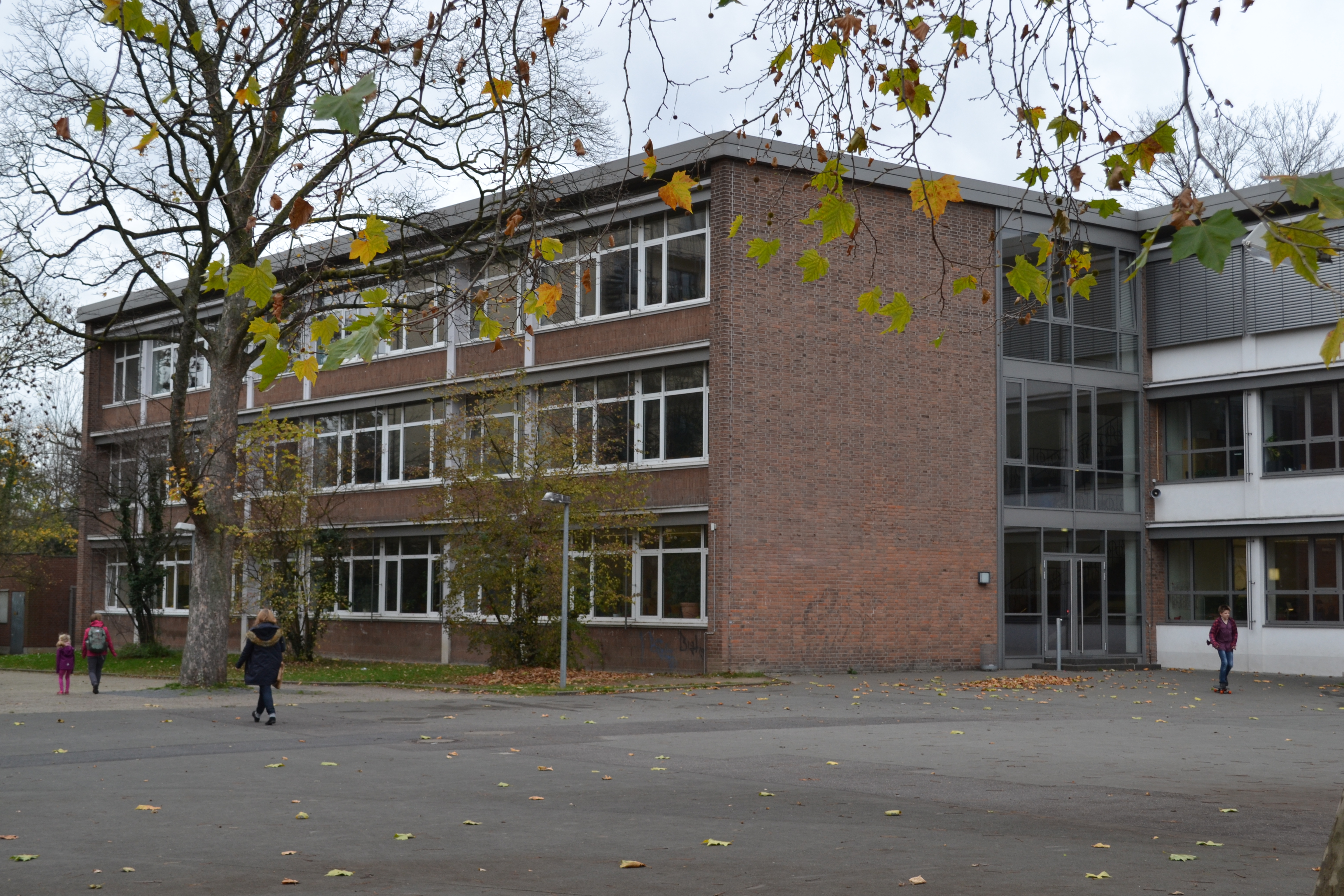 Aussenaufnahmen Humboldt-Gymnasium Düsseldorf im ursprünglichen Zustand